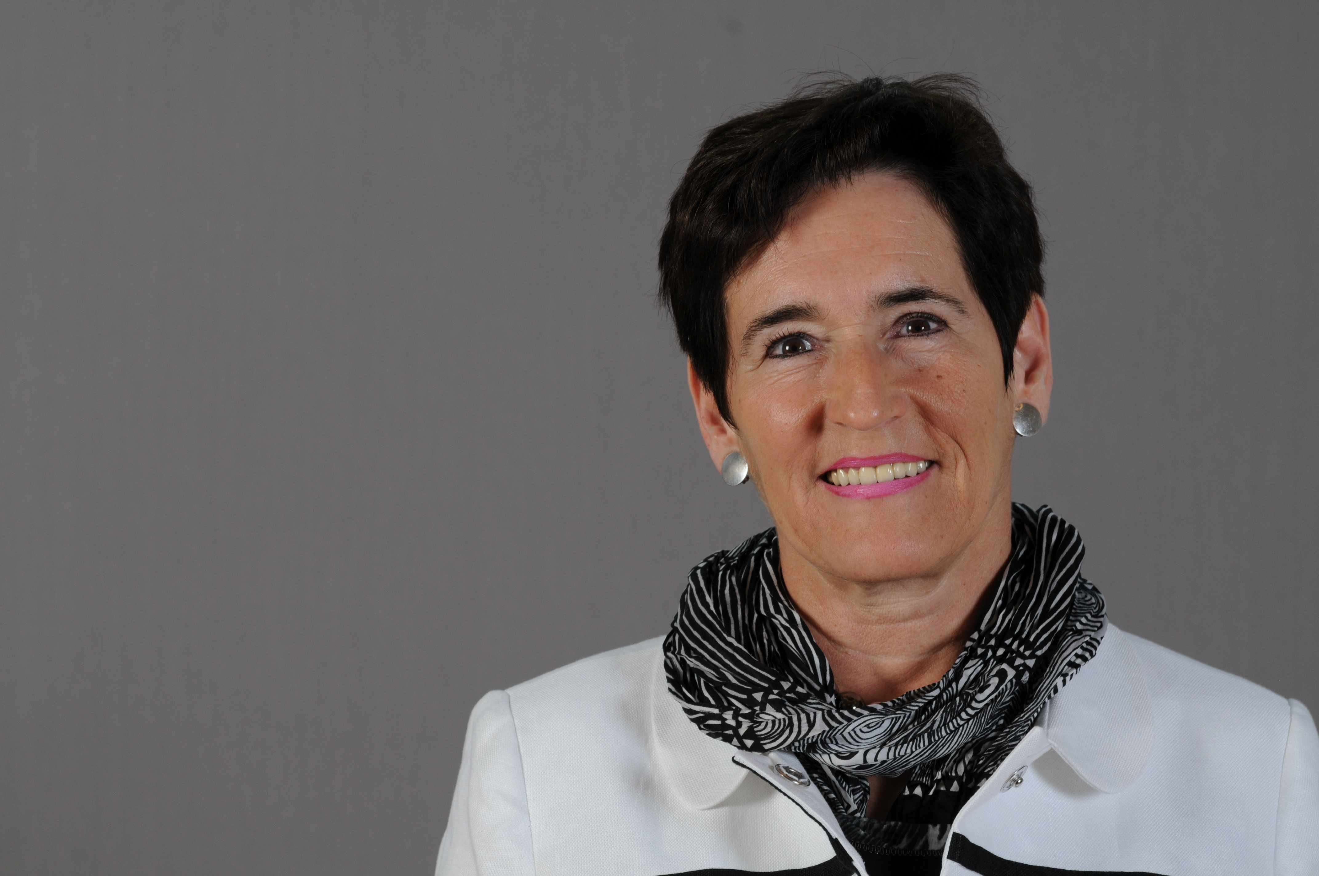 Christa Vladyka. Landtagsabgeordnete in Niederösterreich.